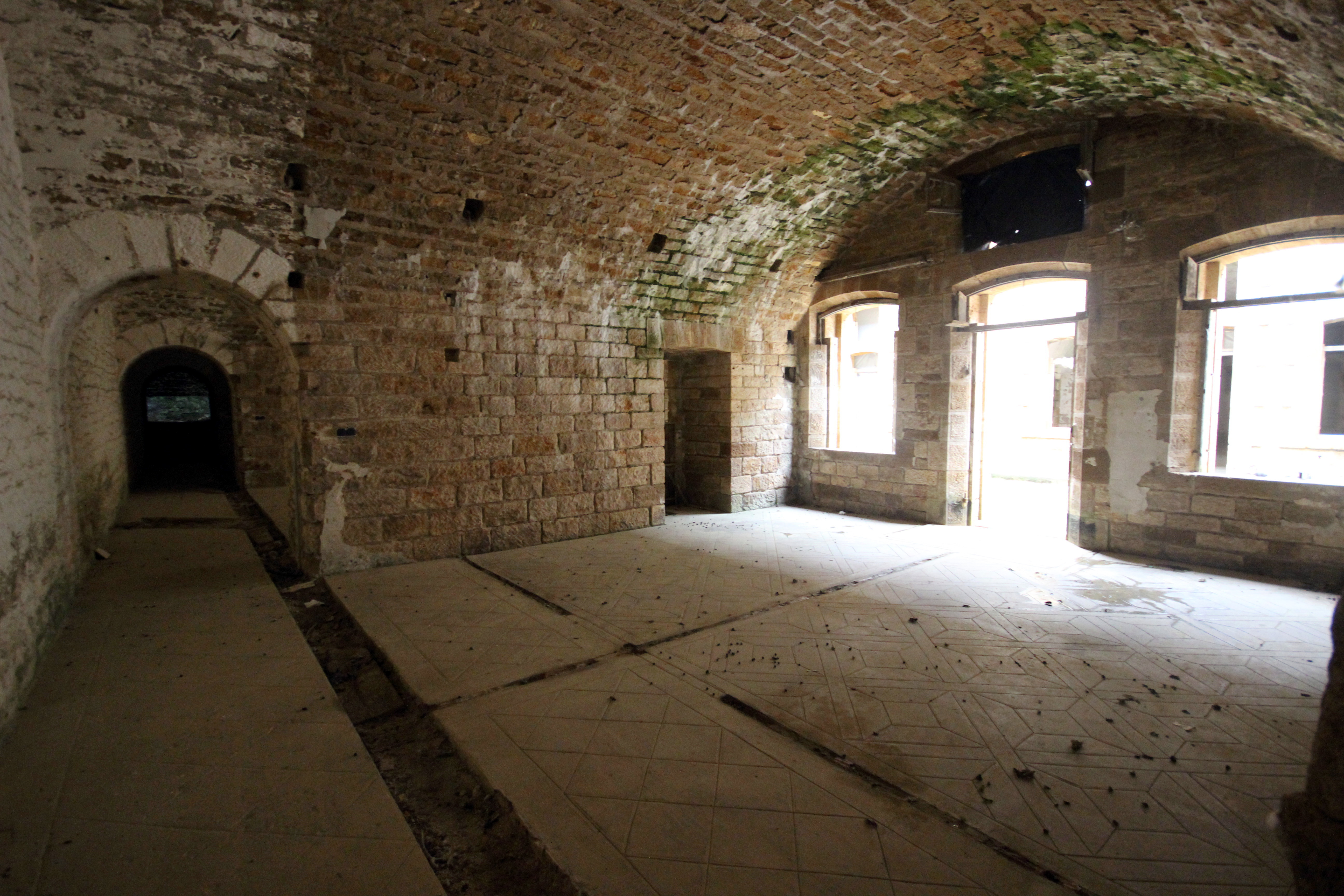 Une chambrée d'officiers avec le couloir du fort du cognelot